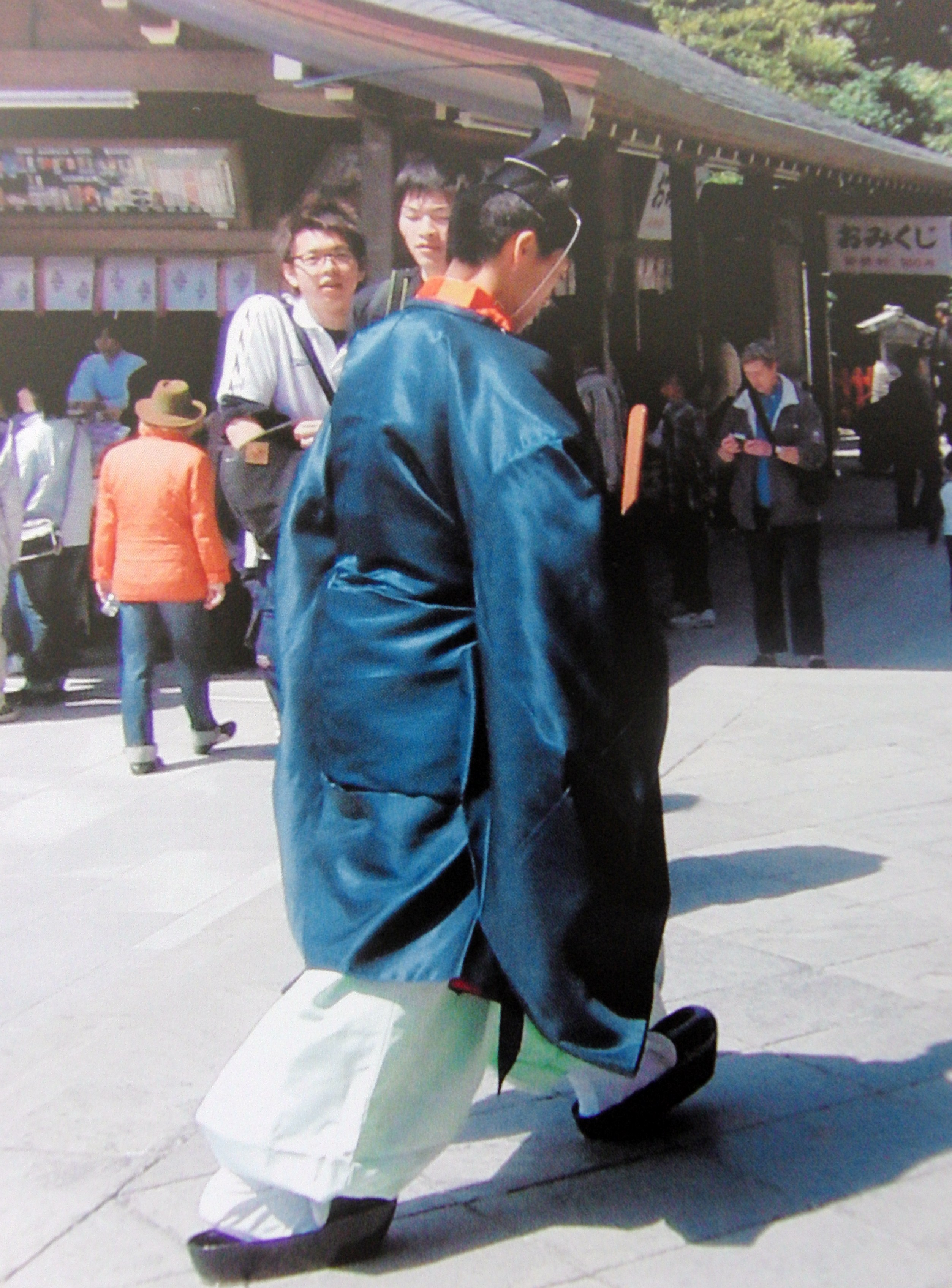 Le Sanctuaire shinto Meiji-jingūnbaku, Tokyo.- au Japon